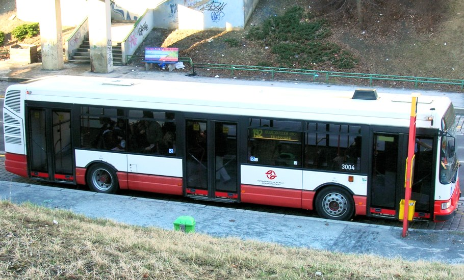 Renault-Karosa Citybus 12M, zastávka Štěpařská (?)